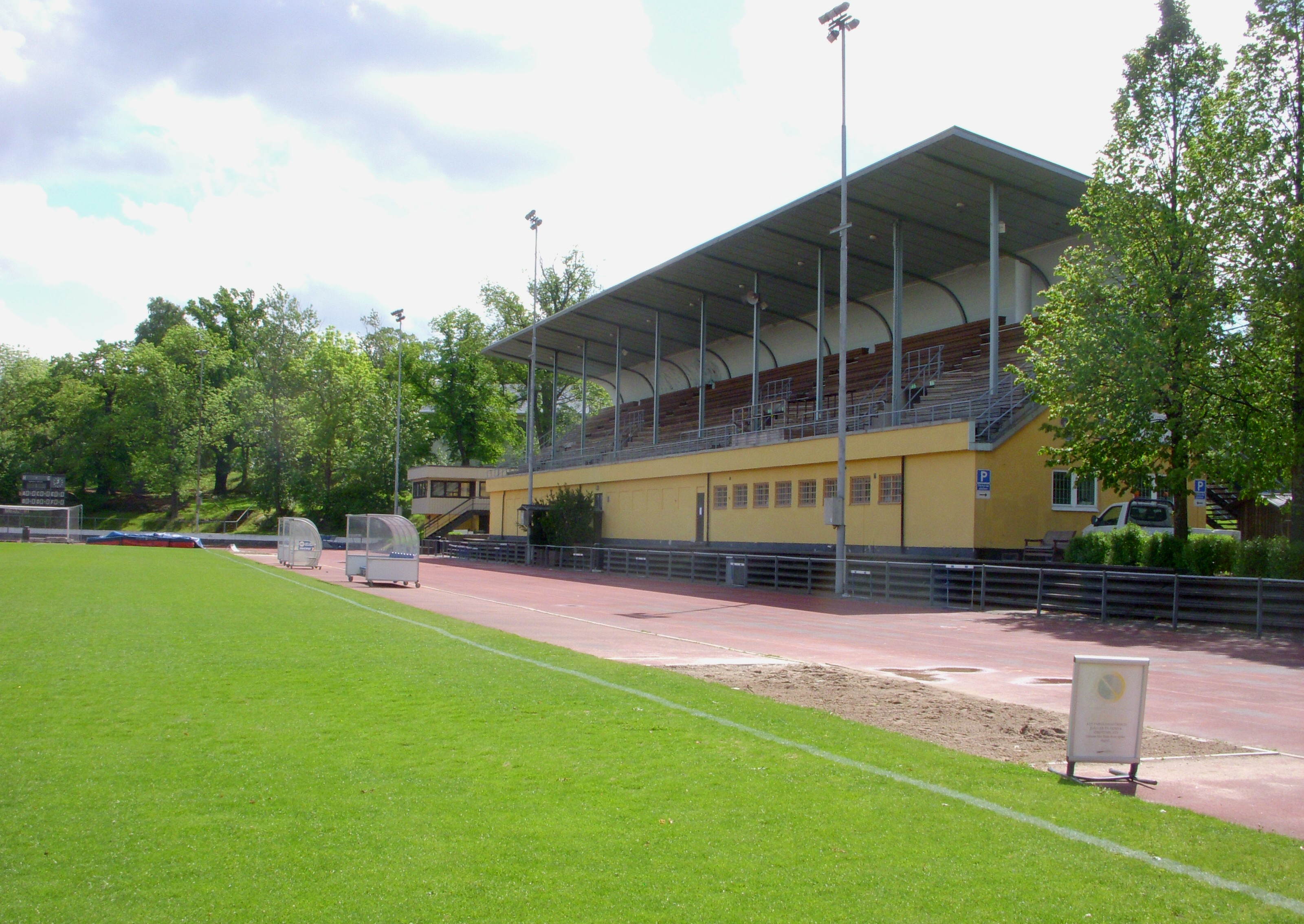 Kristinebergs idrottsplats, läktare